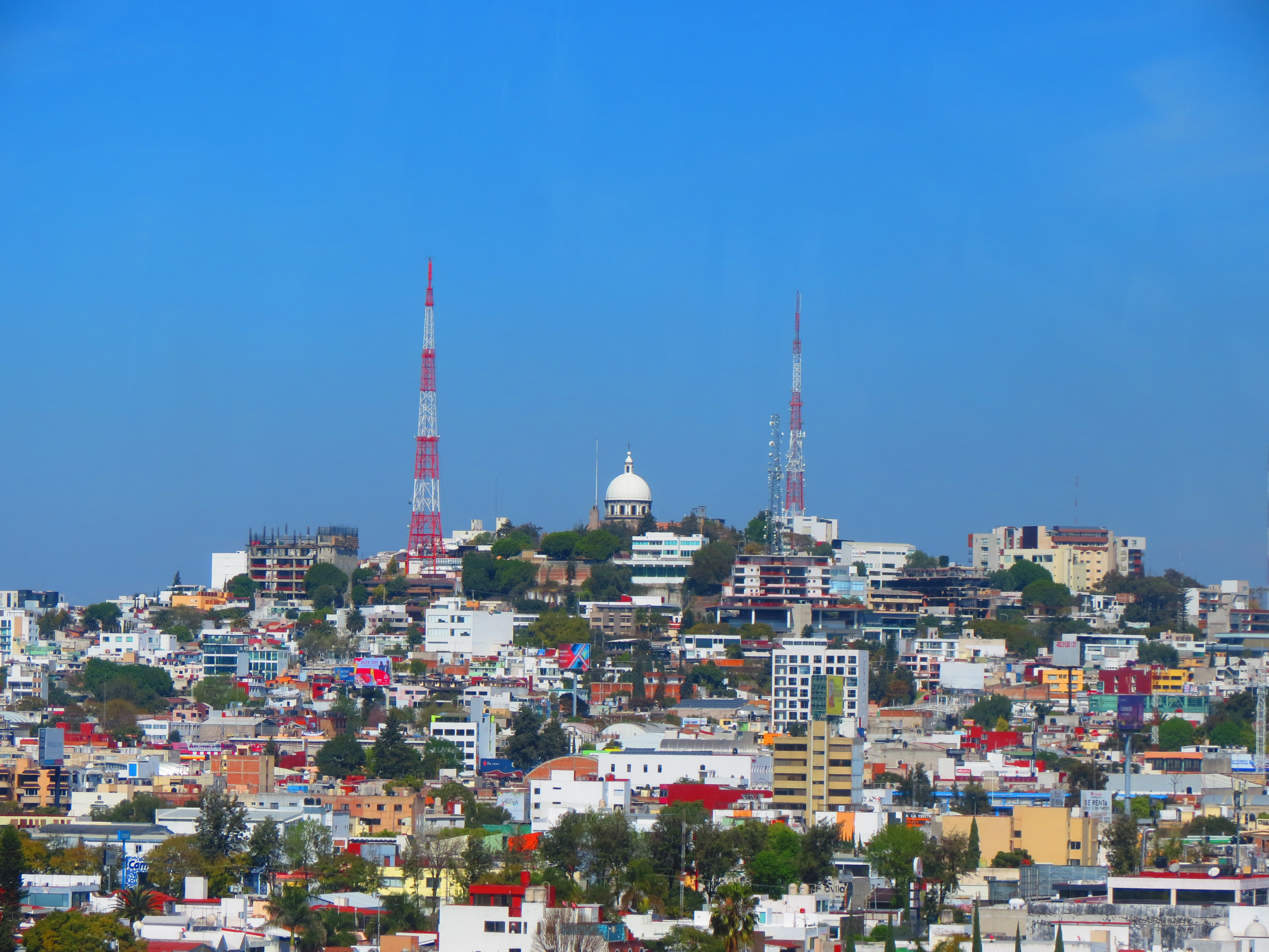 Vista de la Estrella de Puebla